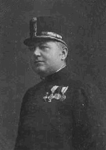 Rafael Kozák (1864 - 1927), Český katolický kněz a vojenský kaplan.